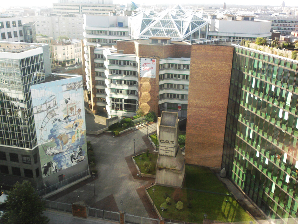 Le siège de la CGT à Montreuil en août 2014